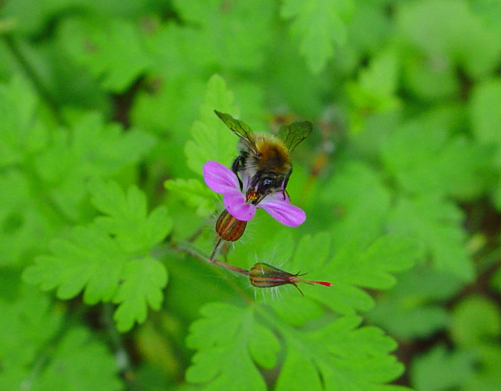 Beschreibung: Stinkender Storchschnabel (Geranium robertianum) Aufnahmedatum: 11. Juni 2005 Fotograf: ArtMechanic